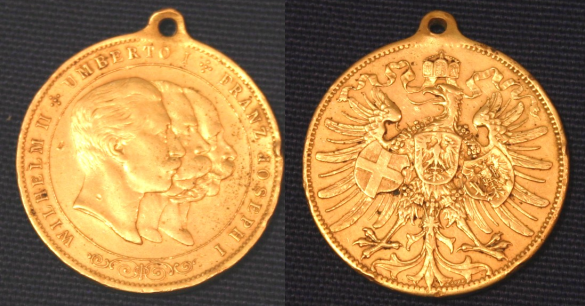 Dreibund Medaille